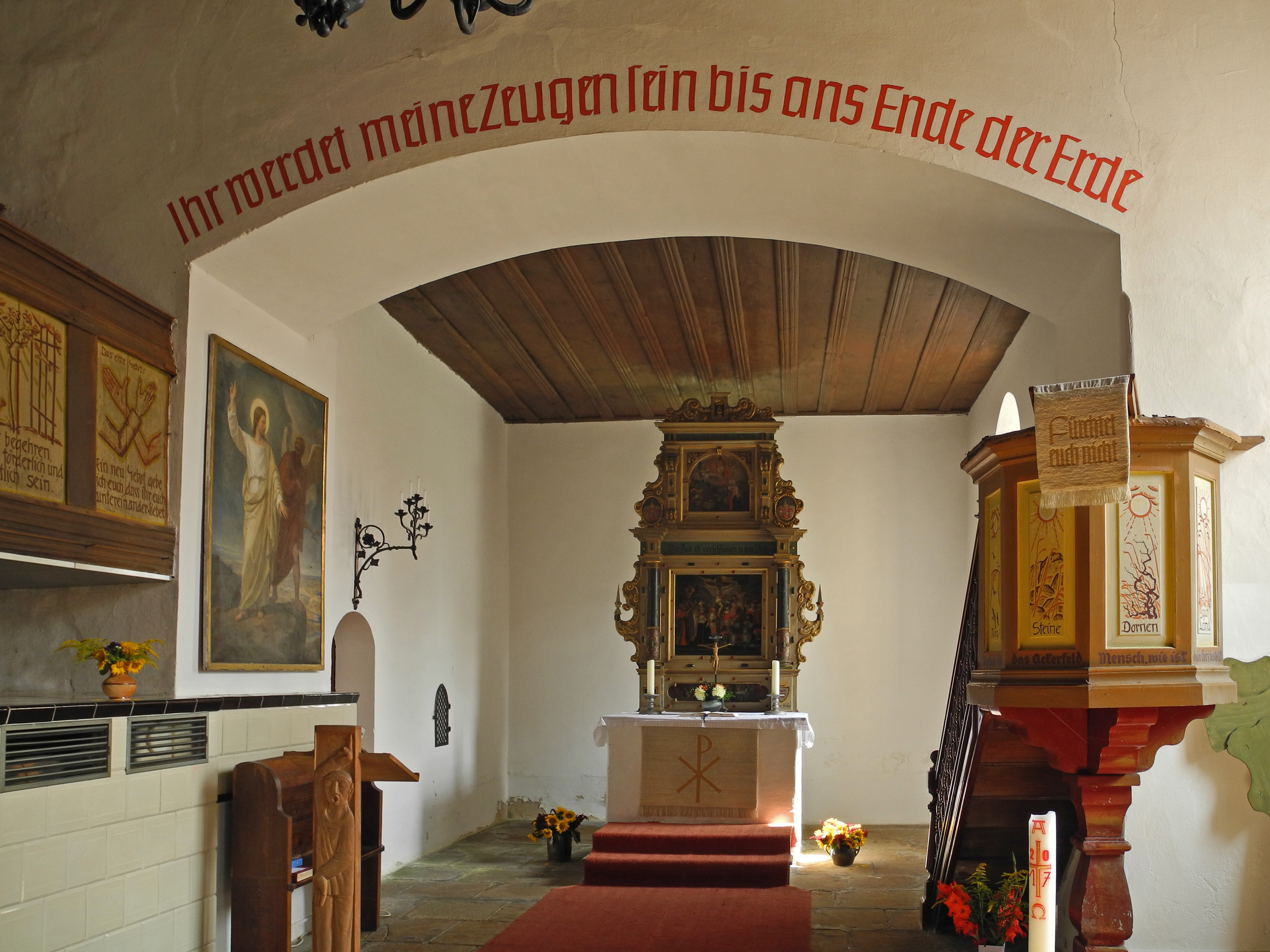 Innenraum der Dorfkirche in Schönborn (OT von Dresden), Seiffersdorfer Str. 5